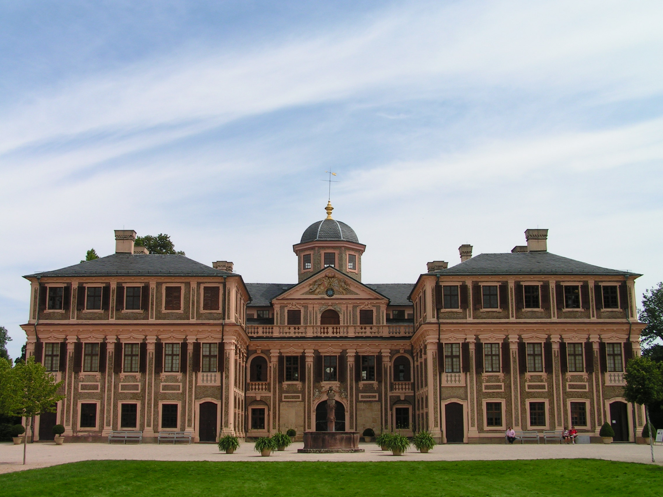 Schloss Favorite Castle, Rastatt, Germany